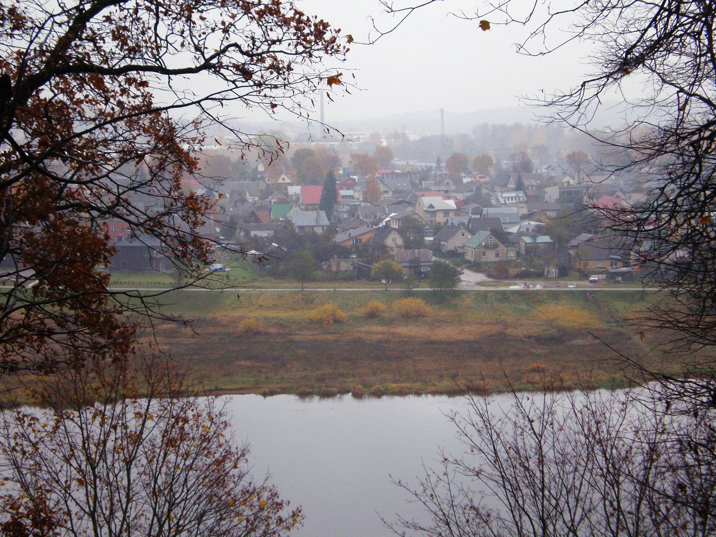 Šančiai nuo Napoleono kalno, Kaunas